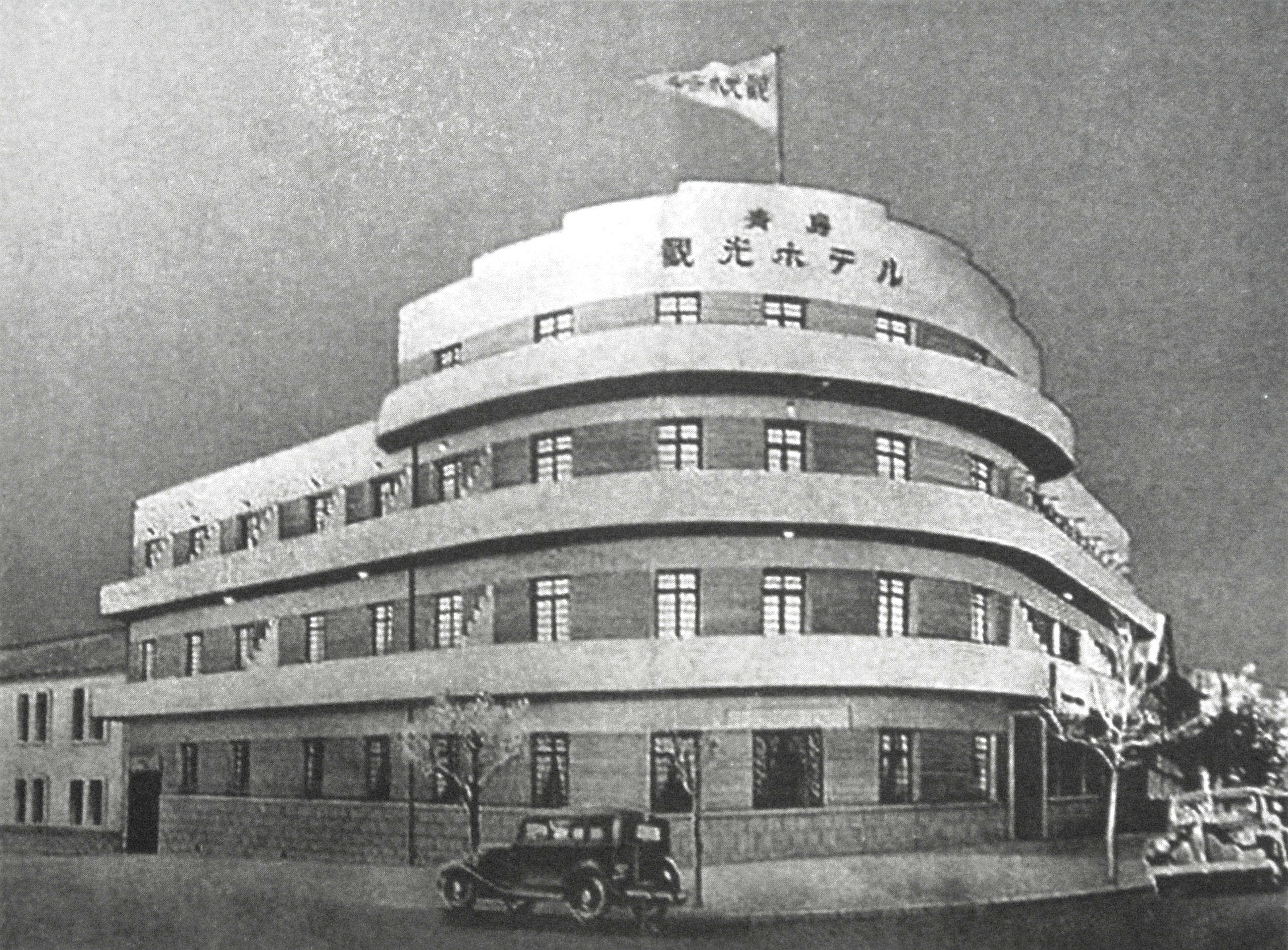 青岛新新公寓旧影